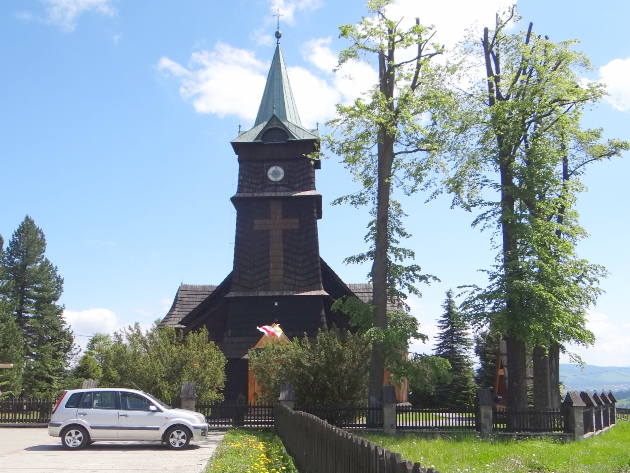 Kościół na Bachledówce